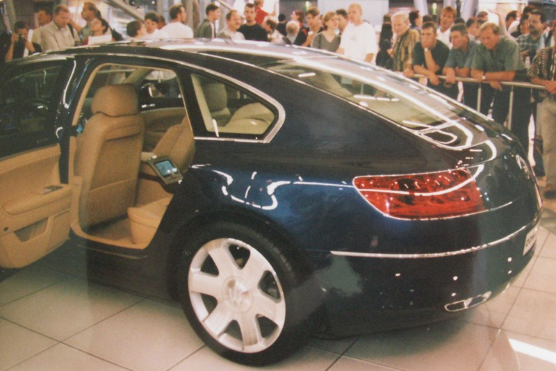 Quelle: selbst fotografiert, IAA 1999 Fotograf: Späth Chr.